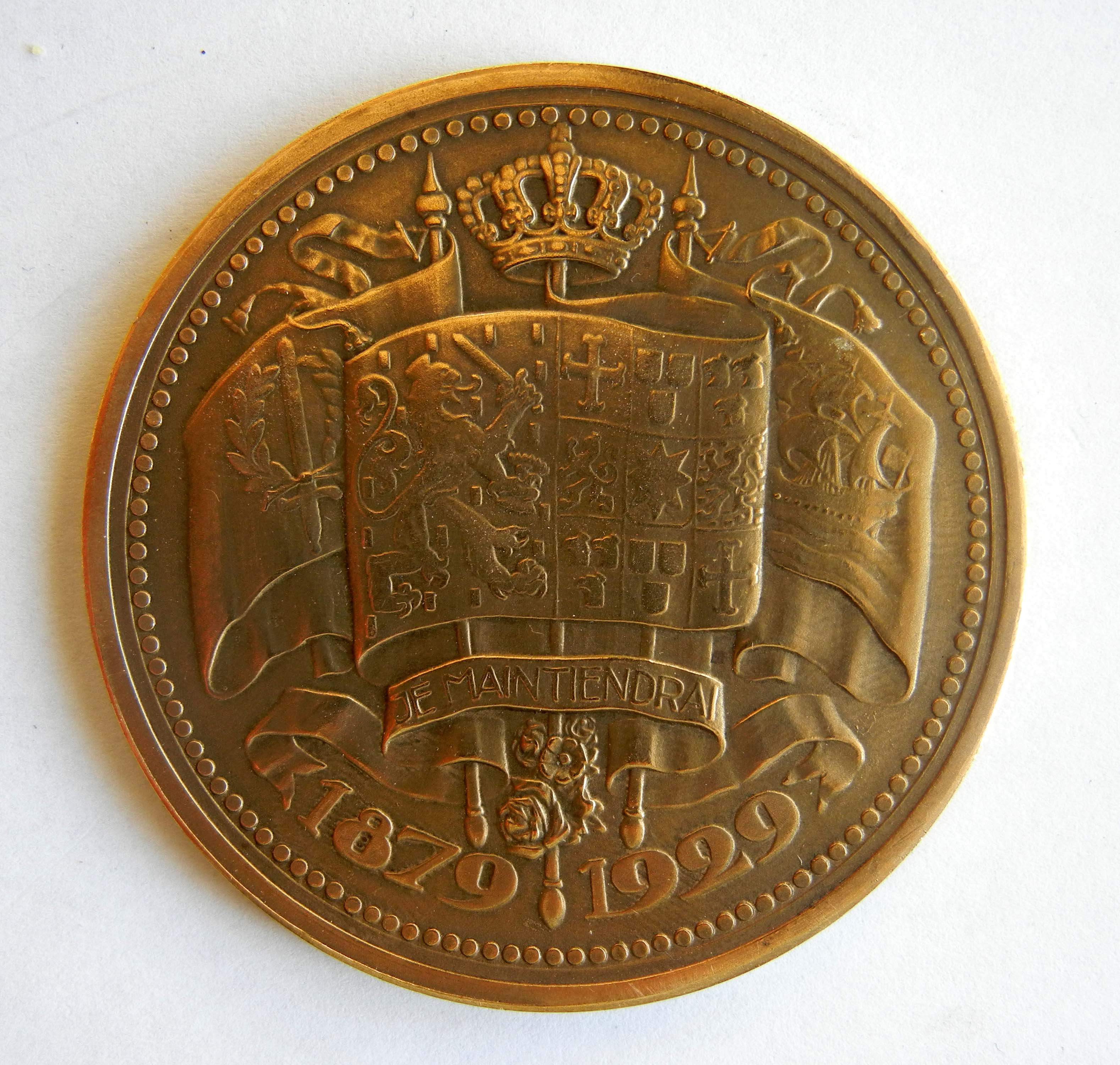 Médaille EMMA KONINGIN-MOEDER (Emma reine-mère) et la devise « Je maintiendrai » 50e anniversaire (1879 – 1929) du règne de Emma de Waldeck-Pyrmont (1858-1934) Graveur : Jac. J van Goor en bronze Diamètre 60 mm Poids 71 grs